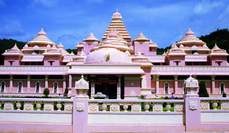 Museum in Tirumala